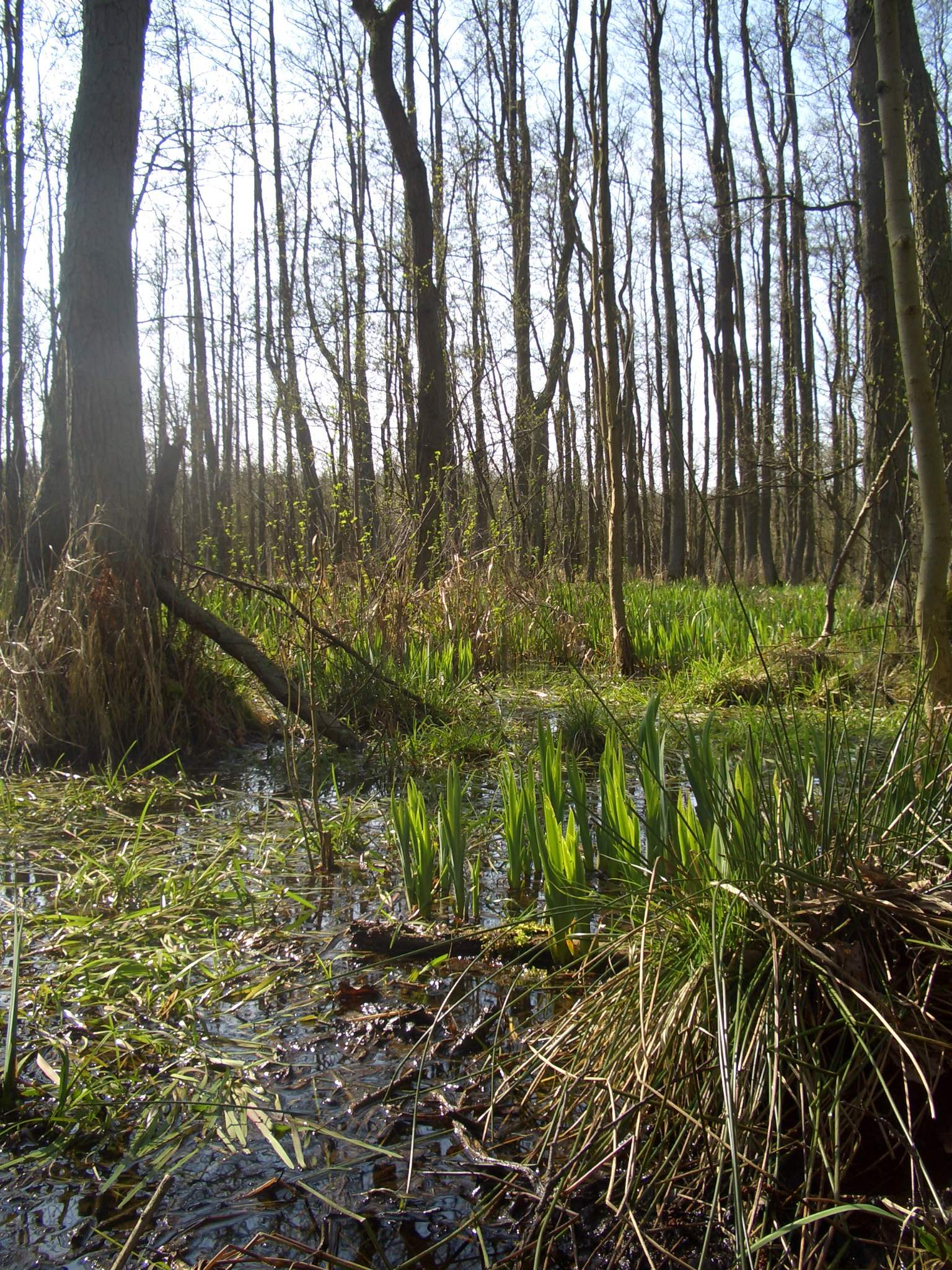 Östlicher Teil des Naturschutzgebietes Großer Peetscher See. Frühlingsaspekt.